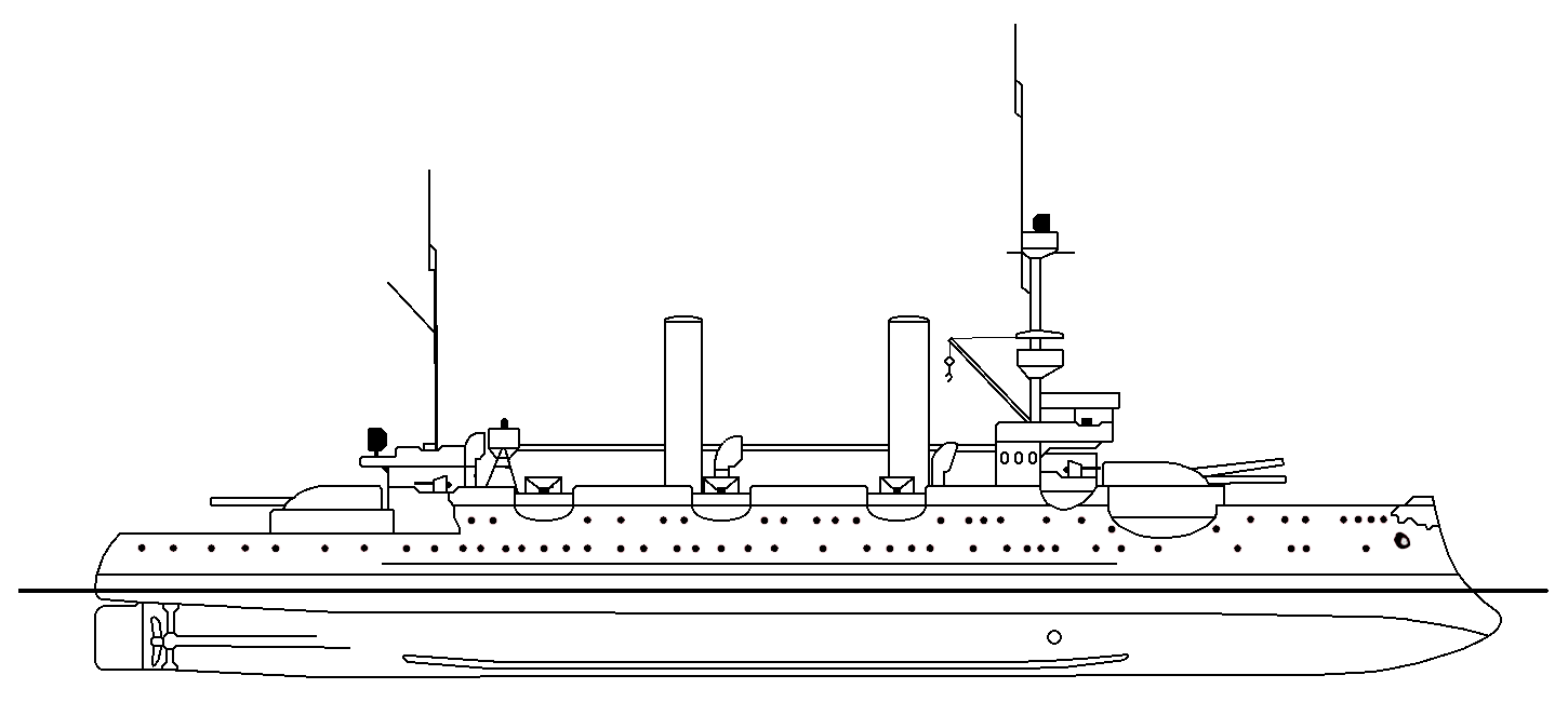 Seitenriss des deutschen Küstenpanzerschiffes SMS Hagen im Zustand von 1910 von steuerbord.